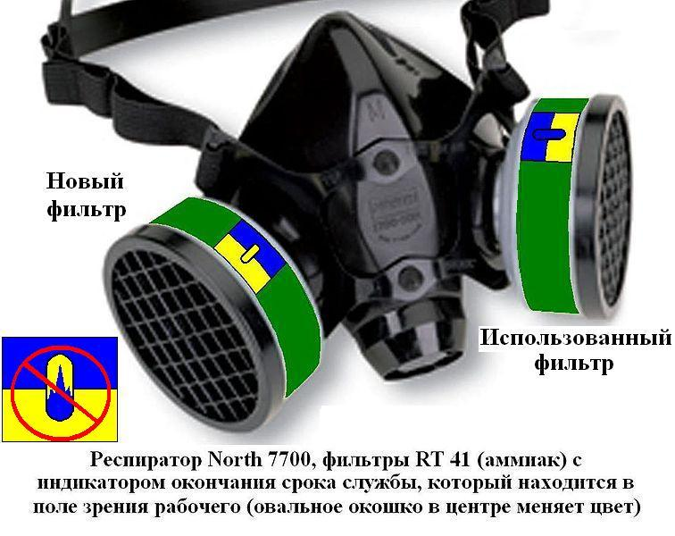 Этот файл - схема установки фильтров с индикатором окончания срока службы на респиратор-полумаску так, что индикатор виден во время работы. Изменение цвета показывает, что скоро фильтр перестанет улавливать аммиак, и нужно покинуть место с загрязнённой атмосферой.